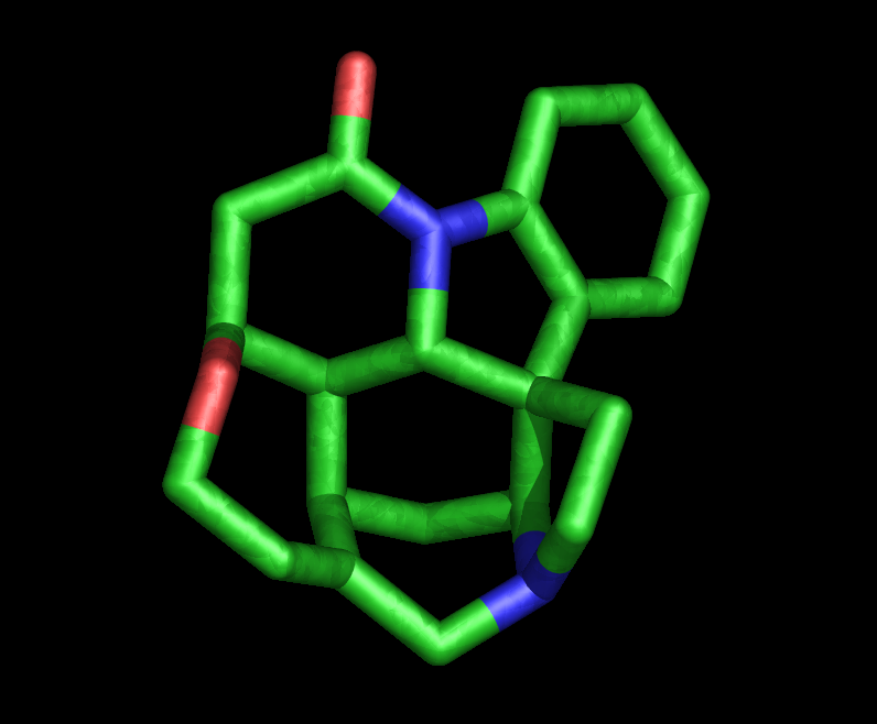 Vue en perspective de la molécule de strychnine. La structure tridimensionnelle est complexe. Les hydrogènes ont été ôtés pour plus de clarté. Image réalisée sur mon PC avec le logiciel PyMol sous NetBSD.